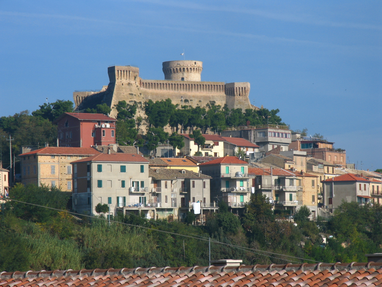 Acquaviva Picena, Marche, ItaliaFortezza di Acquaviva Picena, Fortress of Acquaviva Picena Marche Italy